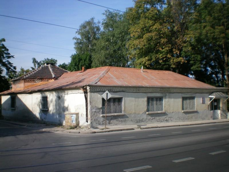 Държавната минерална баня в Княжево 2009г